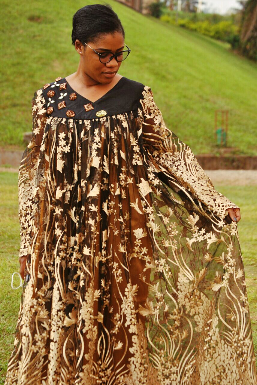 Tenue traditionnelle des femmes Sawa : Le Kaba This is an image from Cameroon